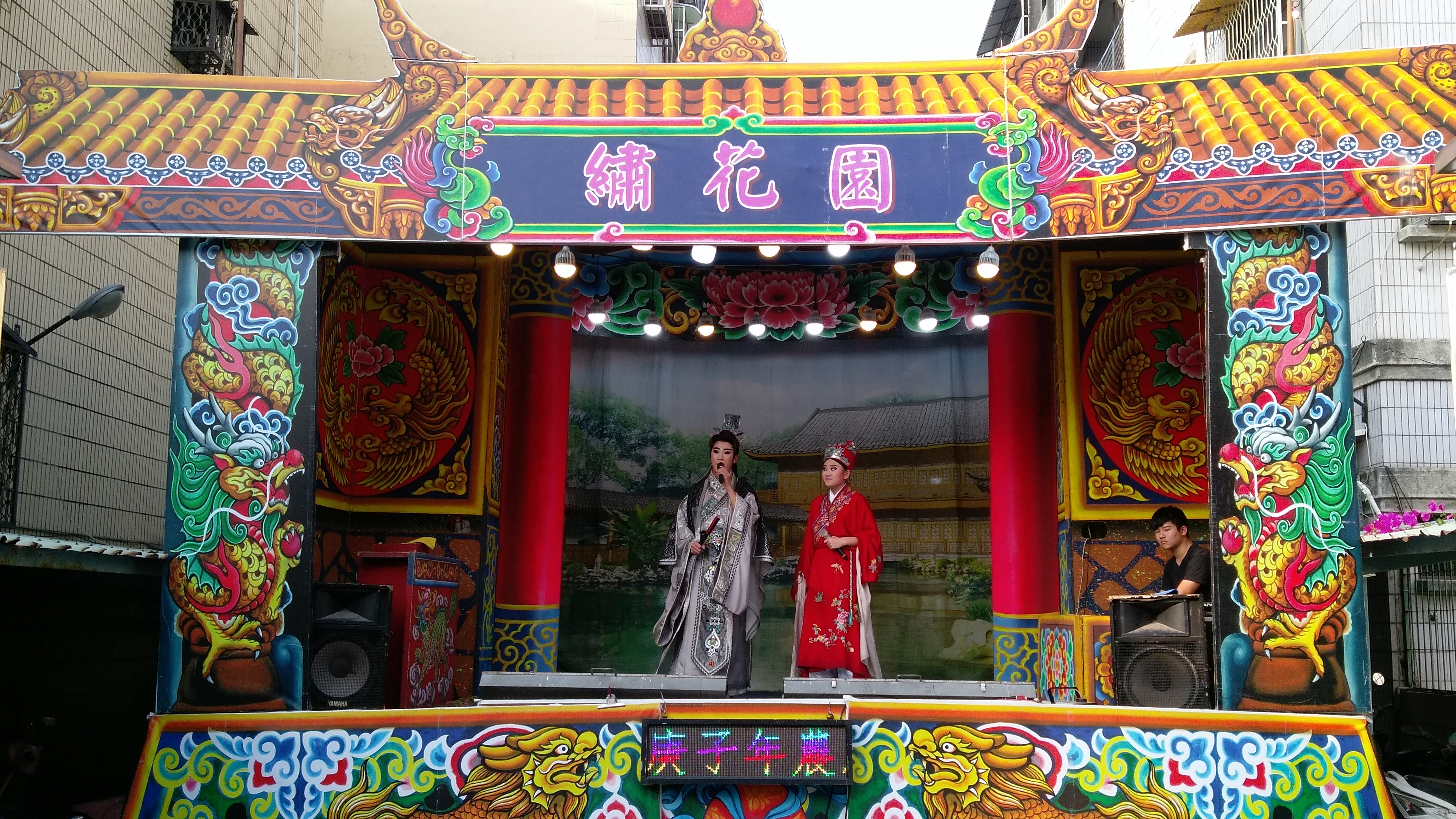 中文（台灣）: 繡花團戲劇團演出